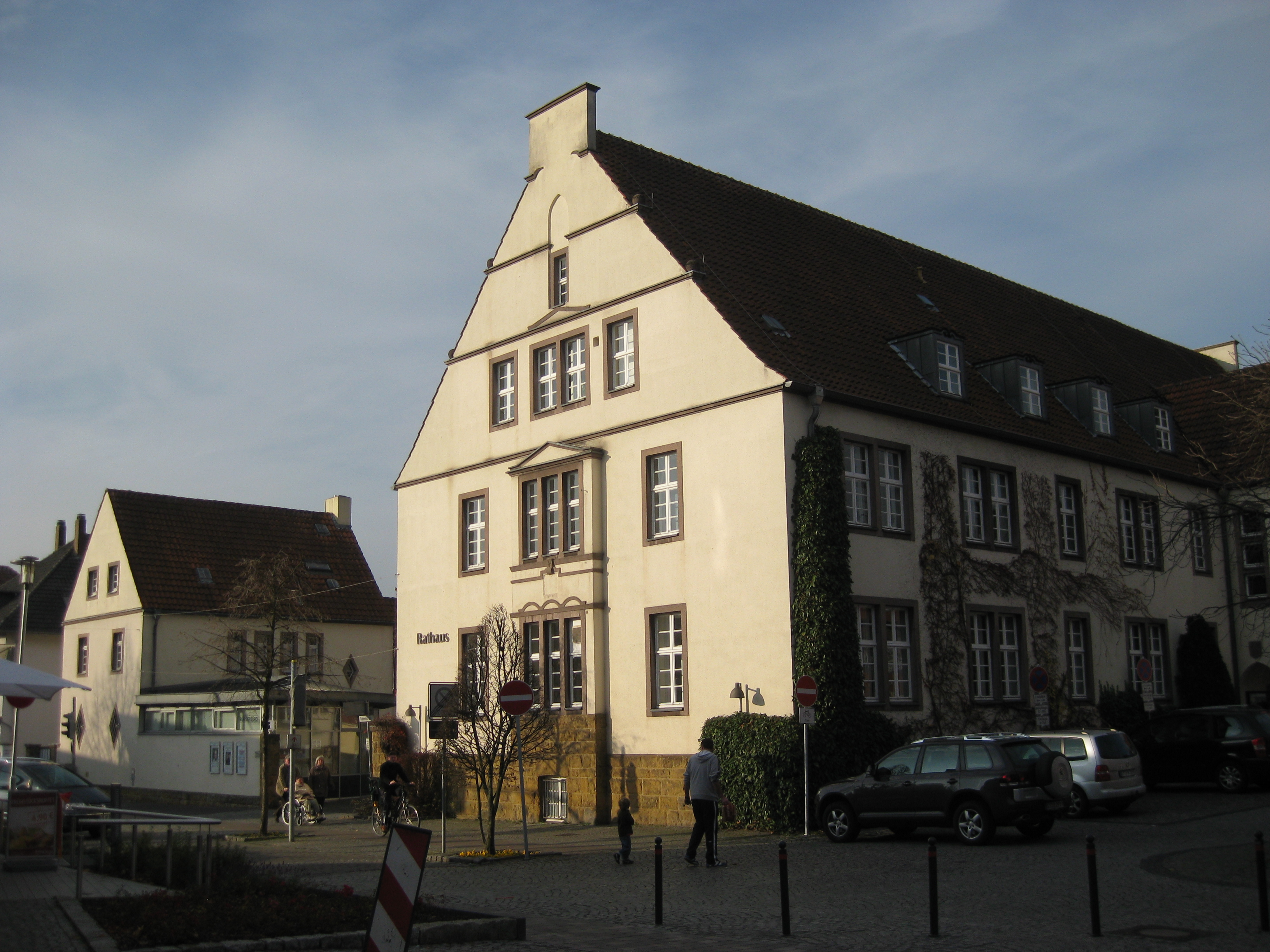 Baudenkmal Rathaus I, Halle (Westfalen)